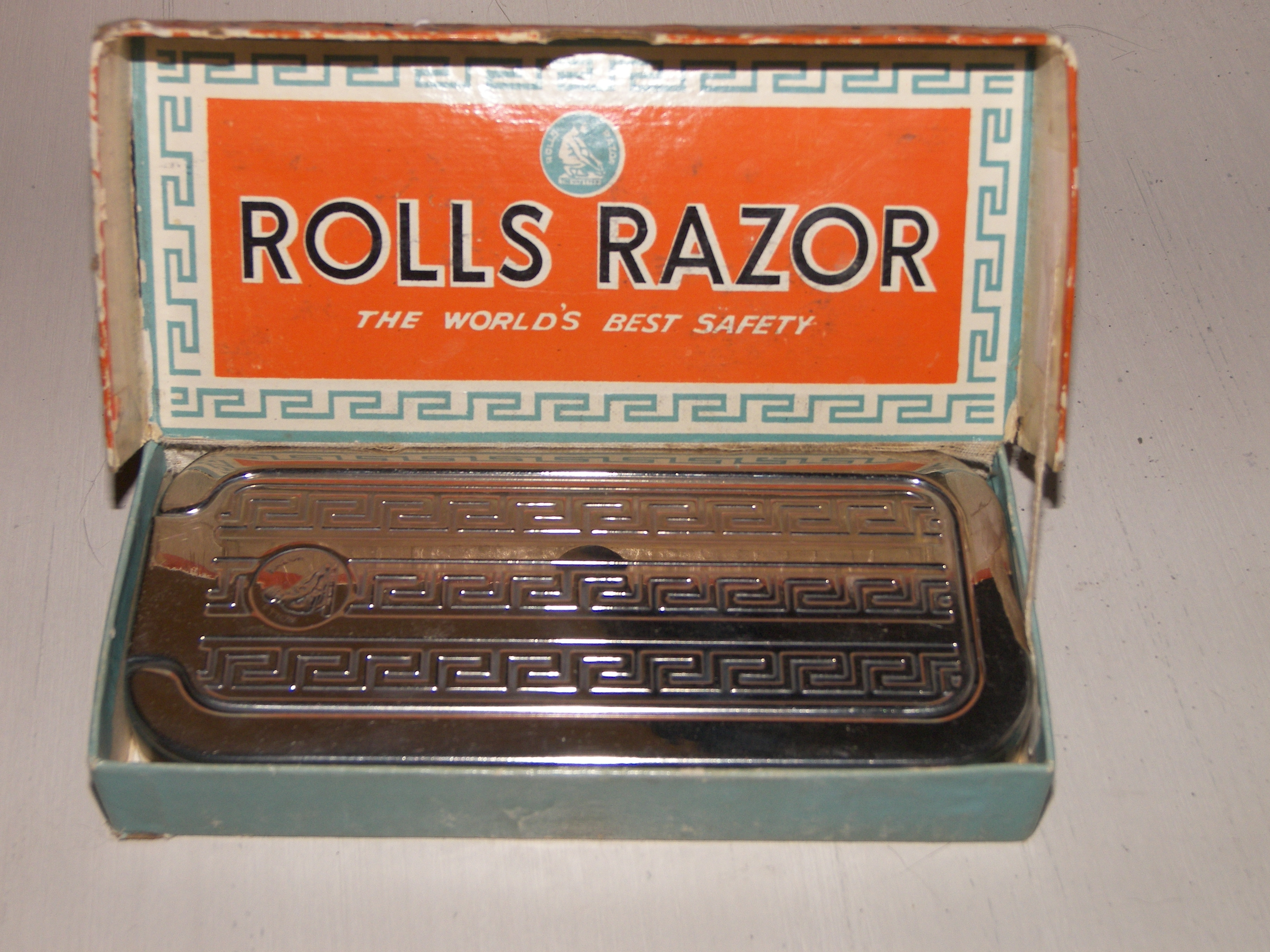 See below